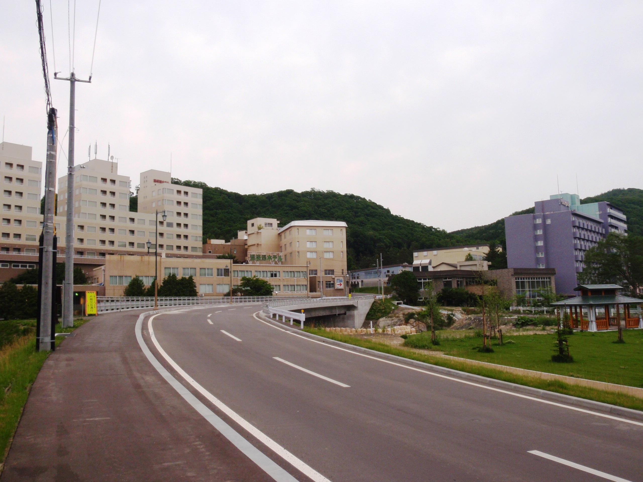 温根湯温泉街